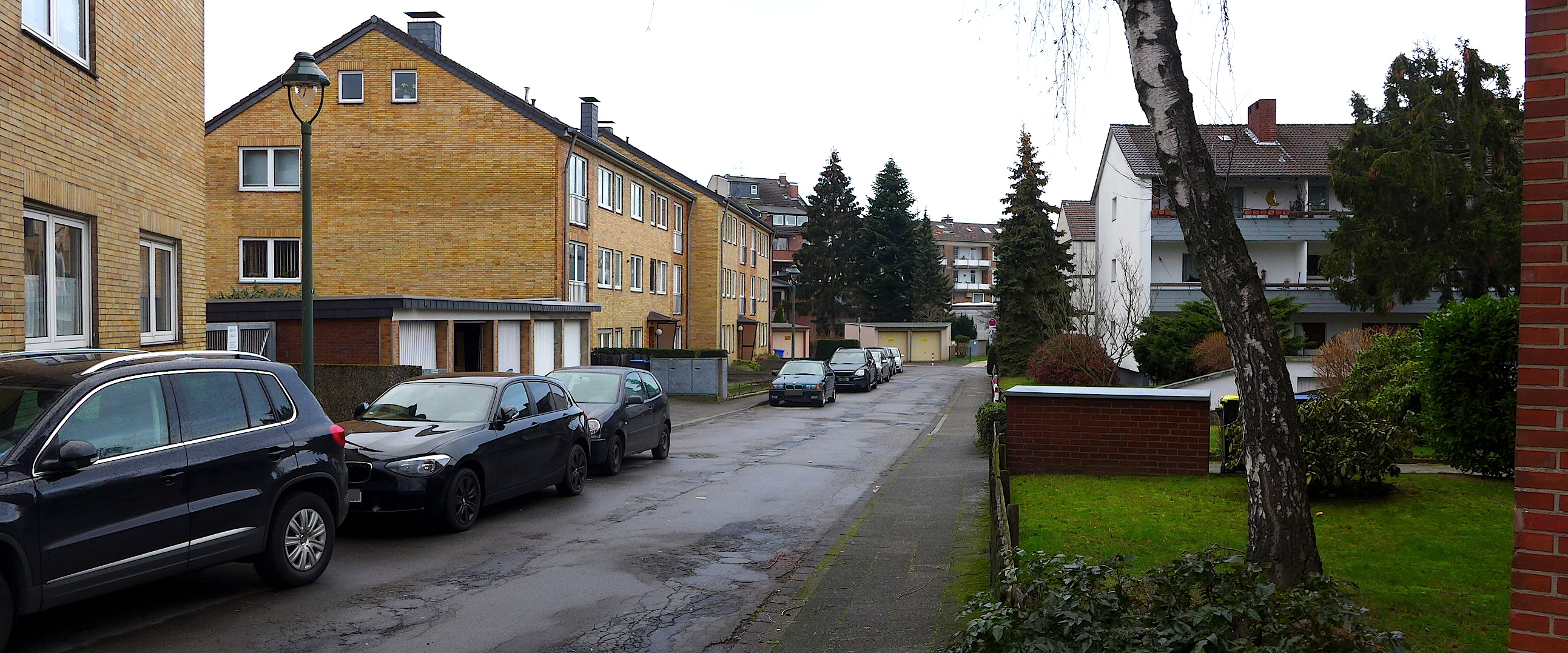 Тупиковый переулок Ам Притшау-хоф в Бенрате (Дюссельдорф).